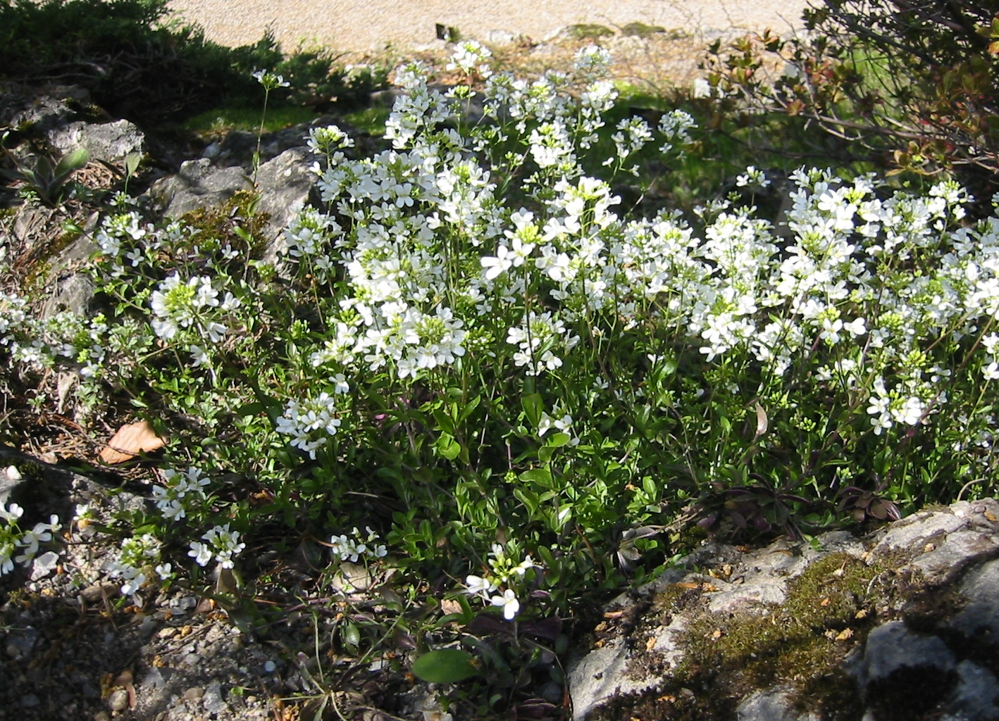 Arabis vochinensis; Botanic Garden, Vienna, Austria.